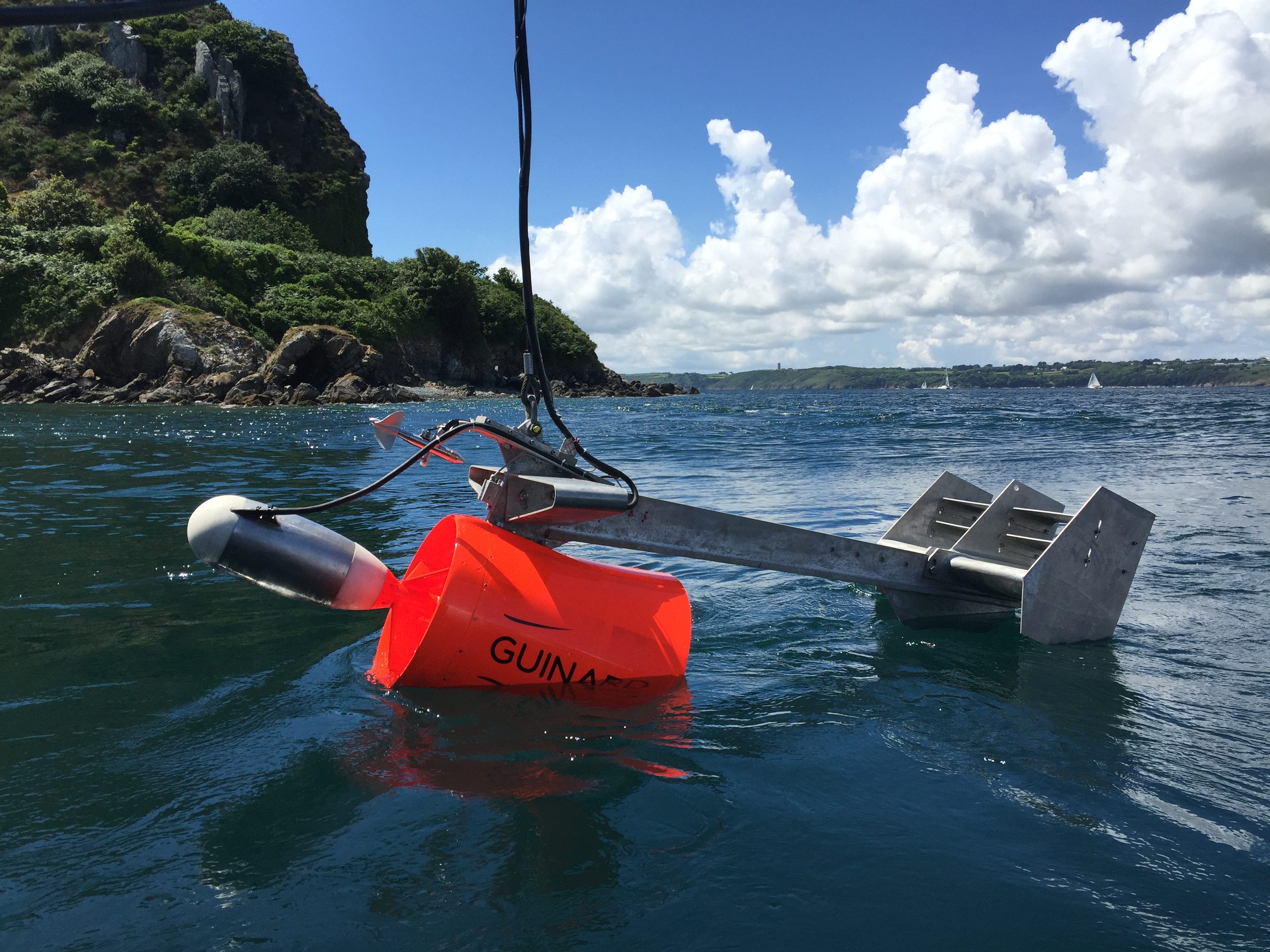 Hydrolienne Guinard Energies 50 cm de diamètre